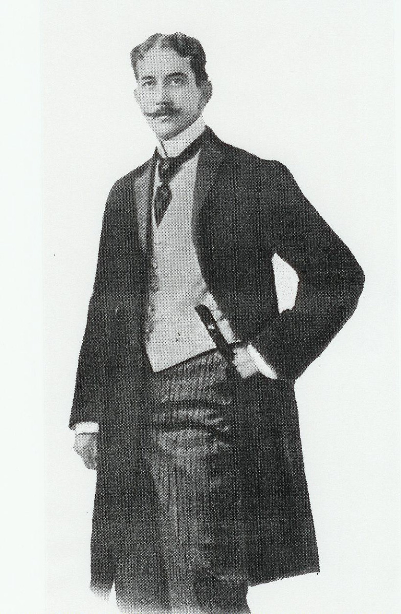 Jesus Castellanos circa 1910